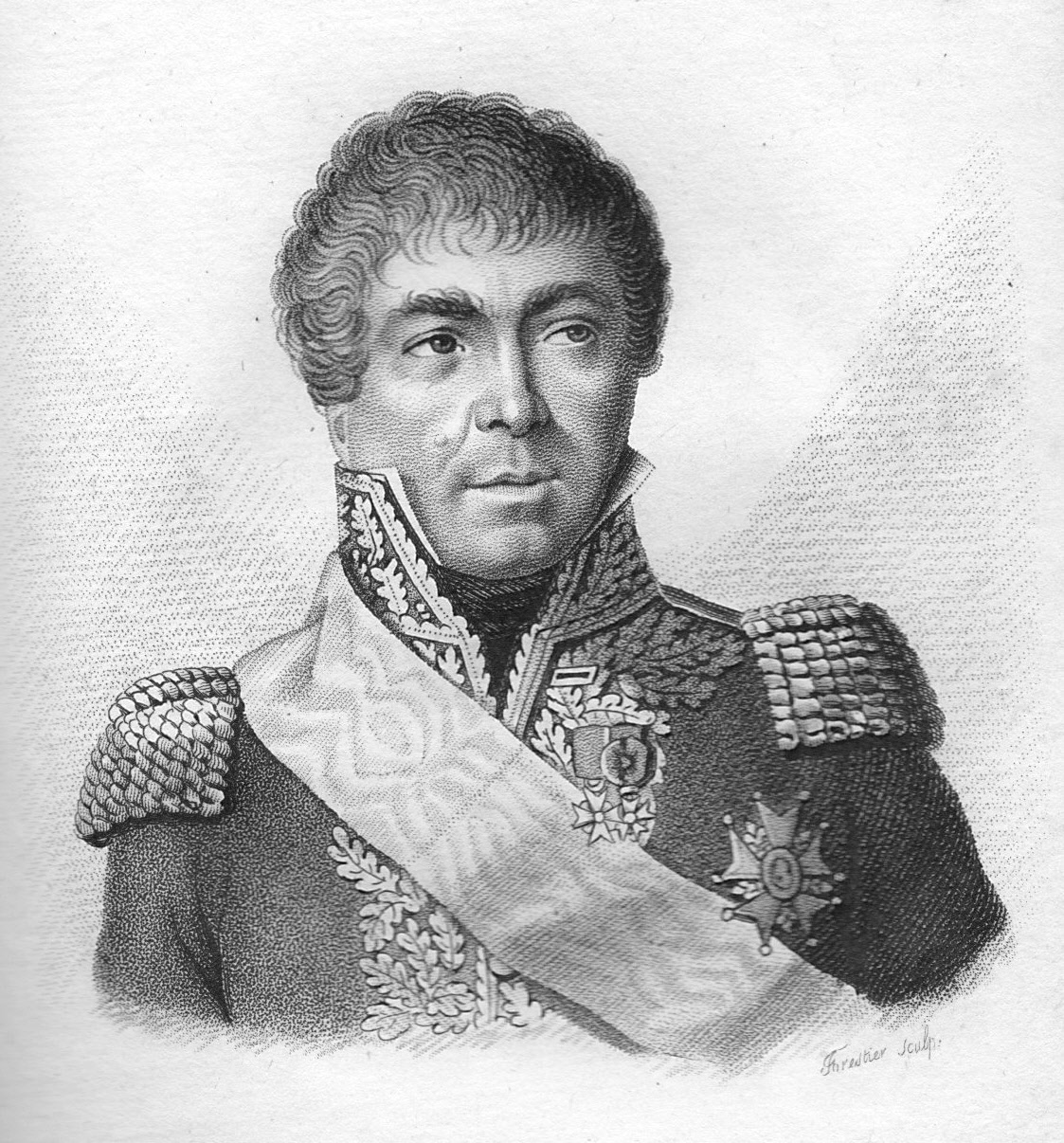 Le général Edme Étienne Borne Desfouneaux (1767-1849). Il participa à l'expédition de Saint-Domingue.